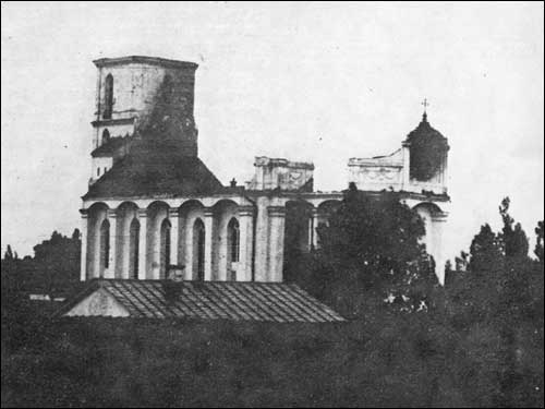 Беларуская (тарашкевіца): Фара Вітаўта, пашкоджаная пажарам у канцы 19 ст.